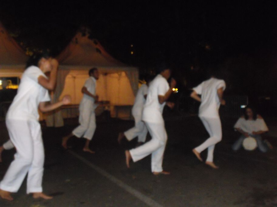 Démonstration de Moring sur la place de la plage de Saint Pierre Réunion.